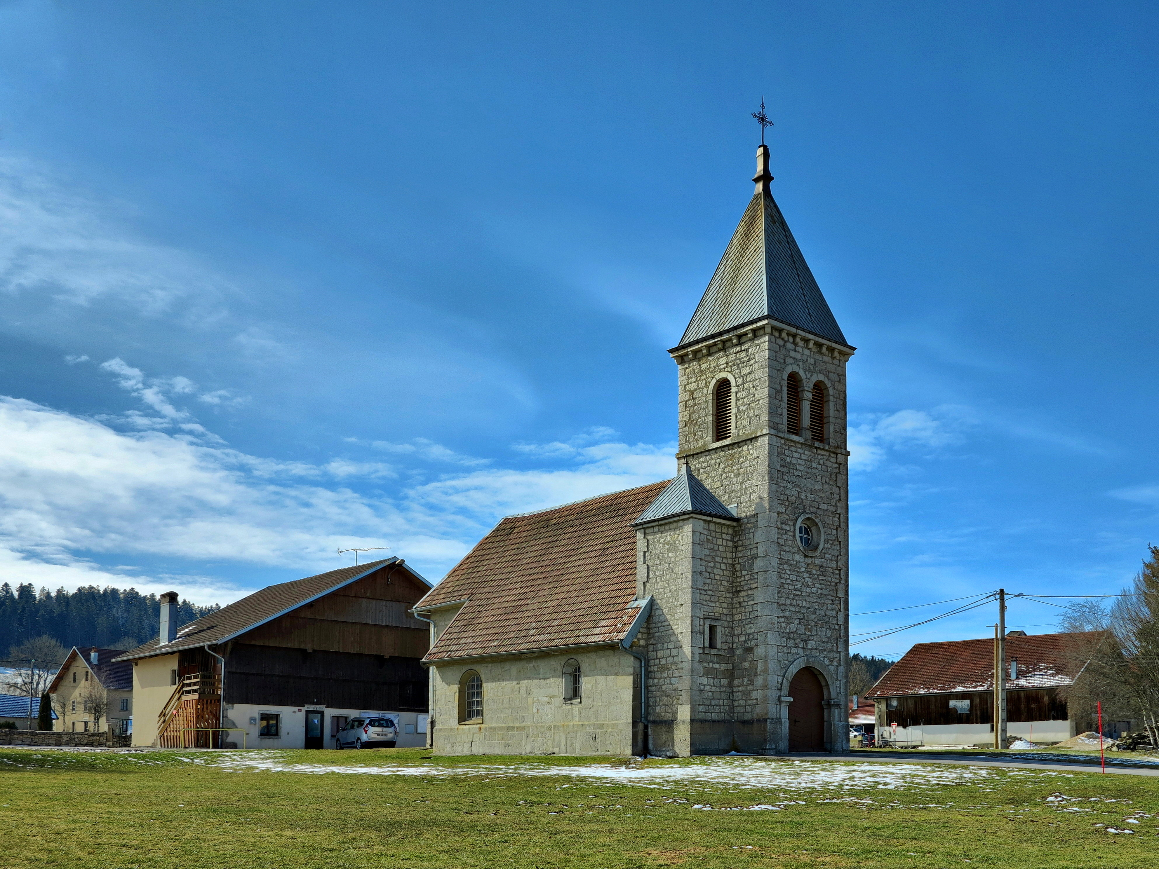 L'église